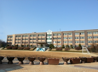 인천장수초등학교